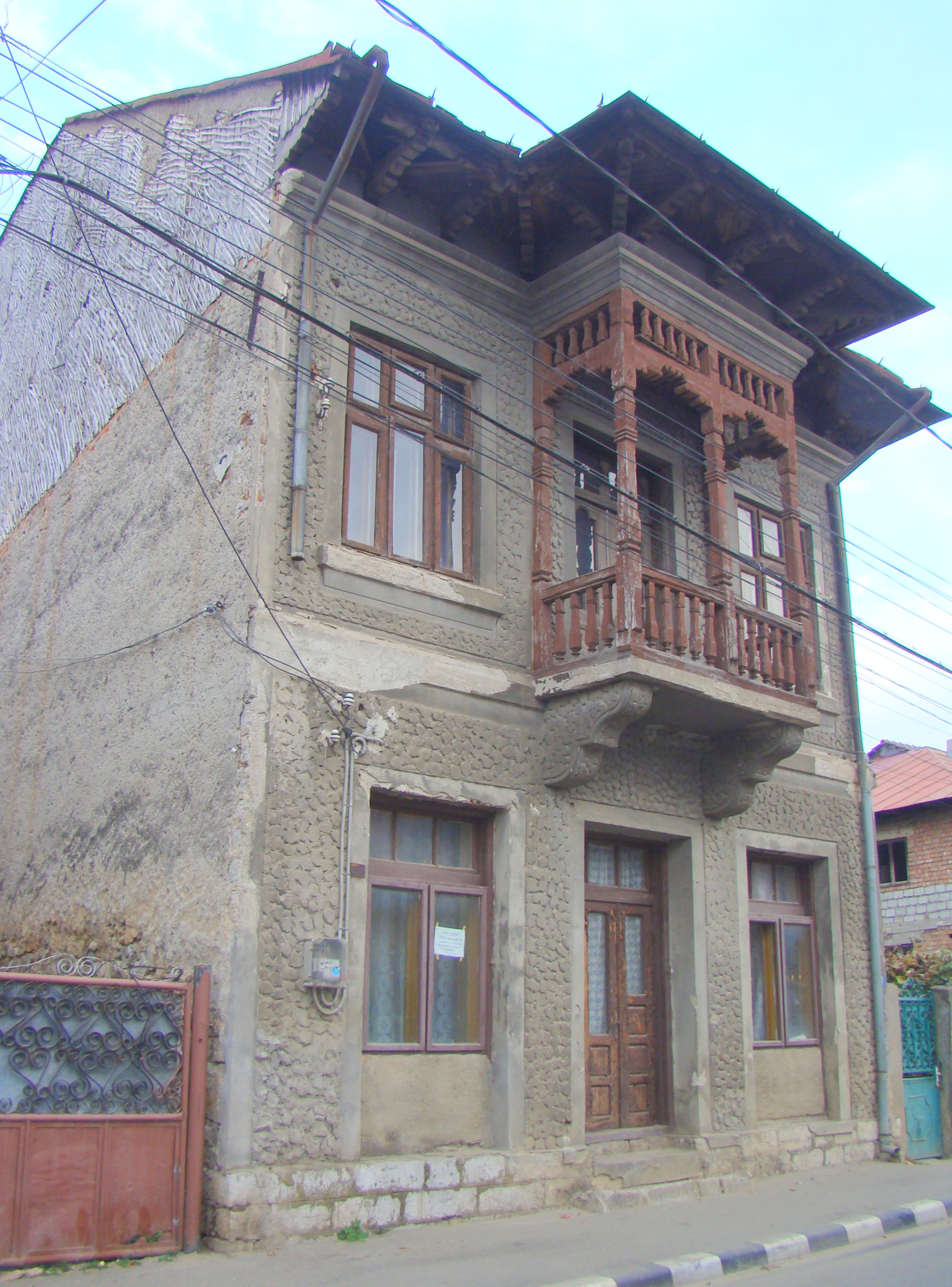 Casă, oraș Baia de Aramă, str. Republicii 7 1901